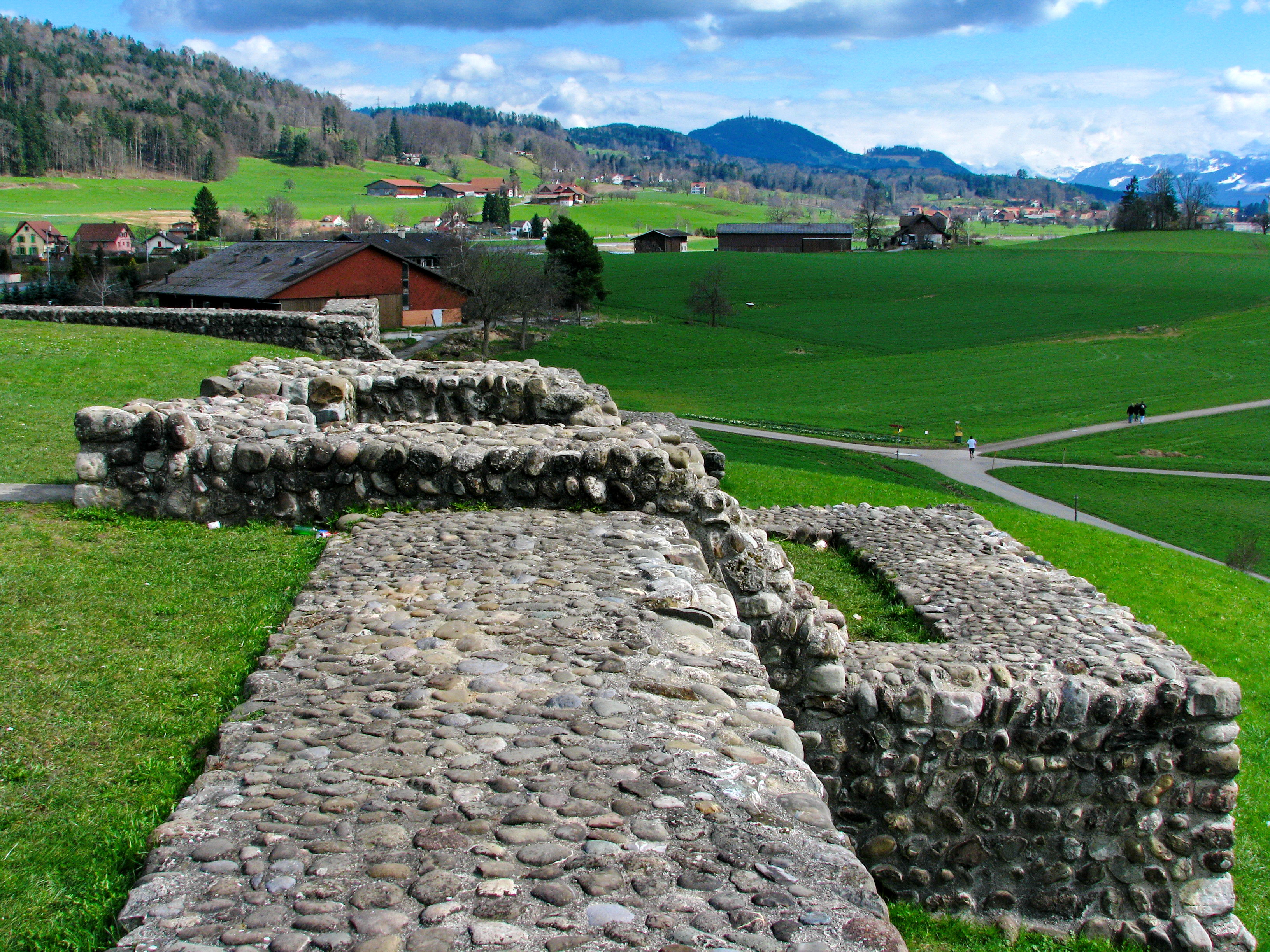 Römisches Kastell in Irgenhausen (Pfäffikon), Irgenhausen, Auslikon und Bachtel (Bildmitte) im Hintergrund